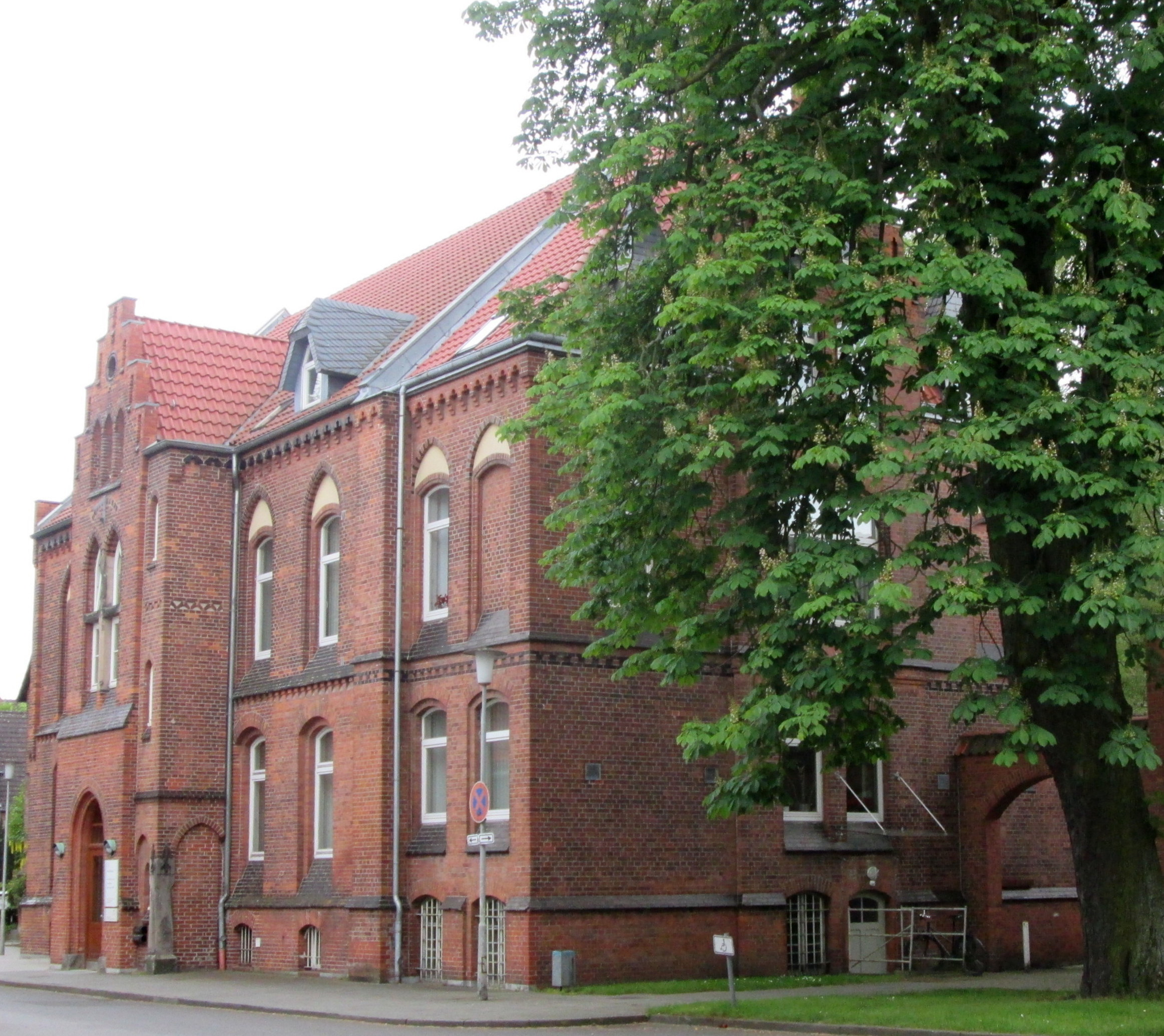 Stephansstift Hauptgebäude - Hannover-Kleefeld Kirchröder Straße